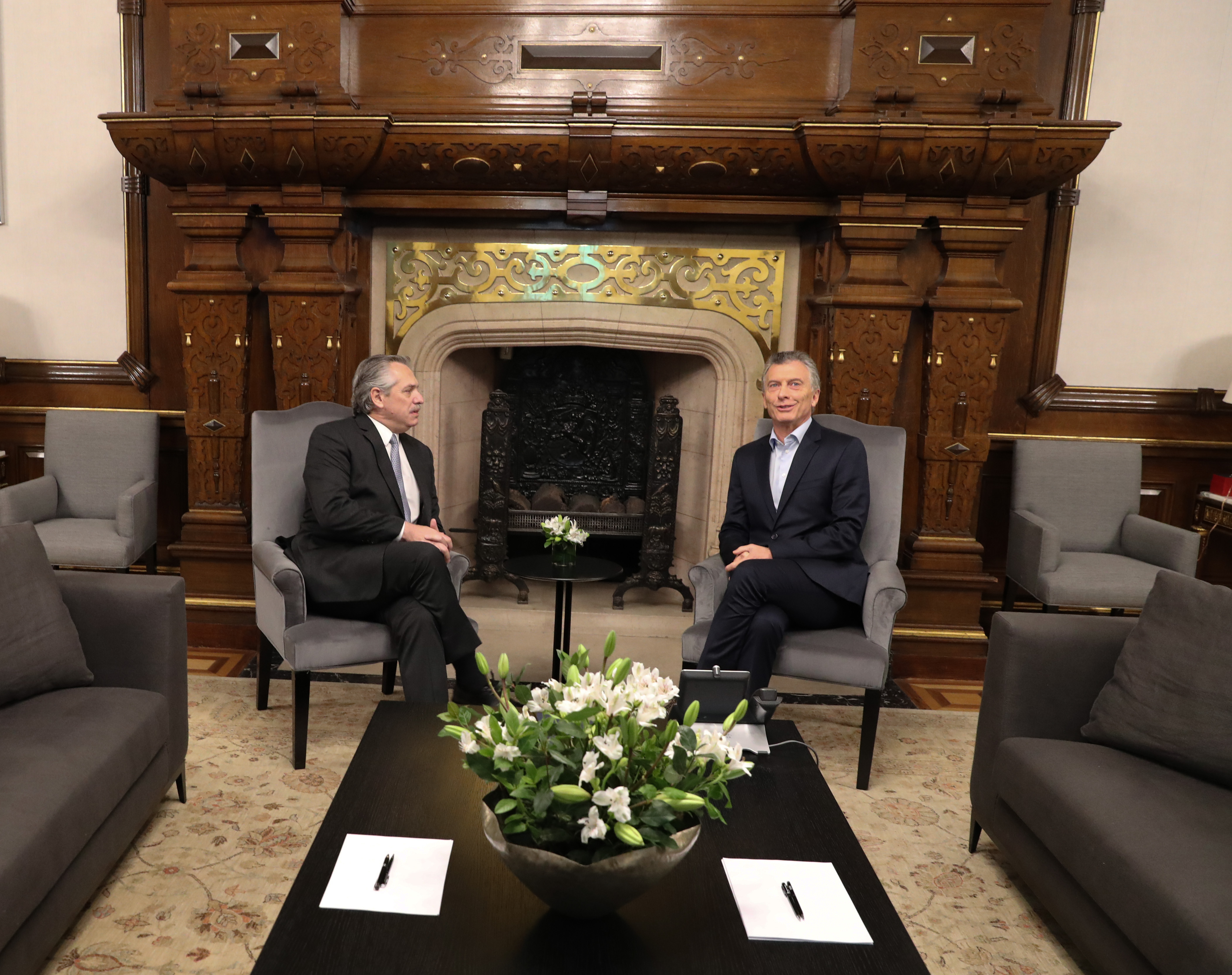 El presidente Mauricio Macri se reunió con el presidente electo, Alberto Fernández, en la Casa Rosada.